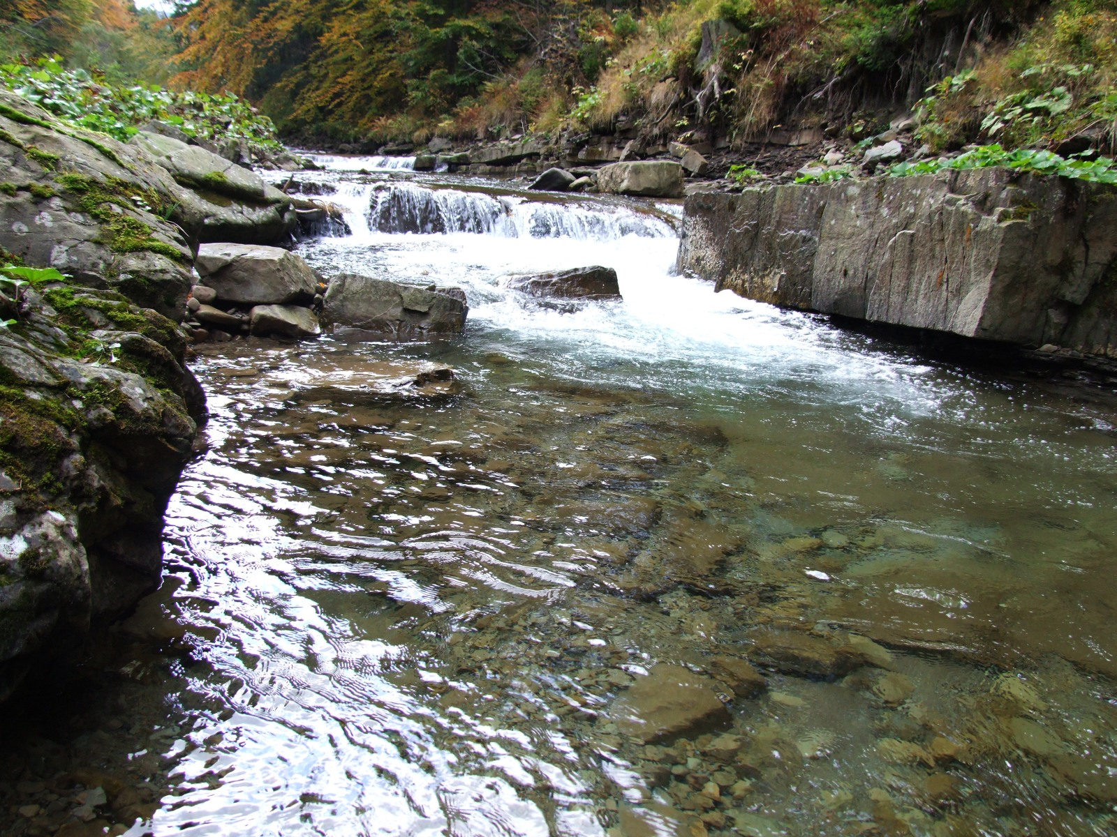 Kamienica Gorczańska powyżej Trusiówki